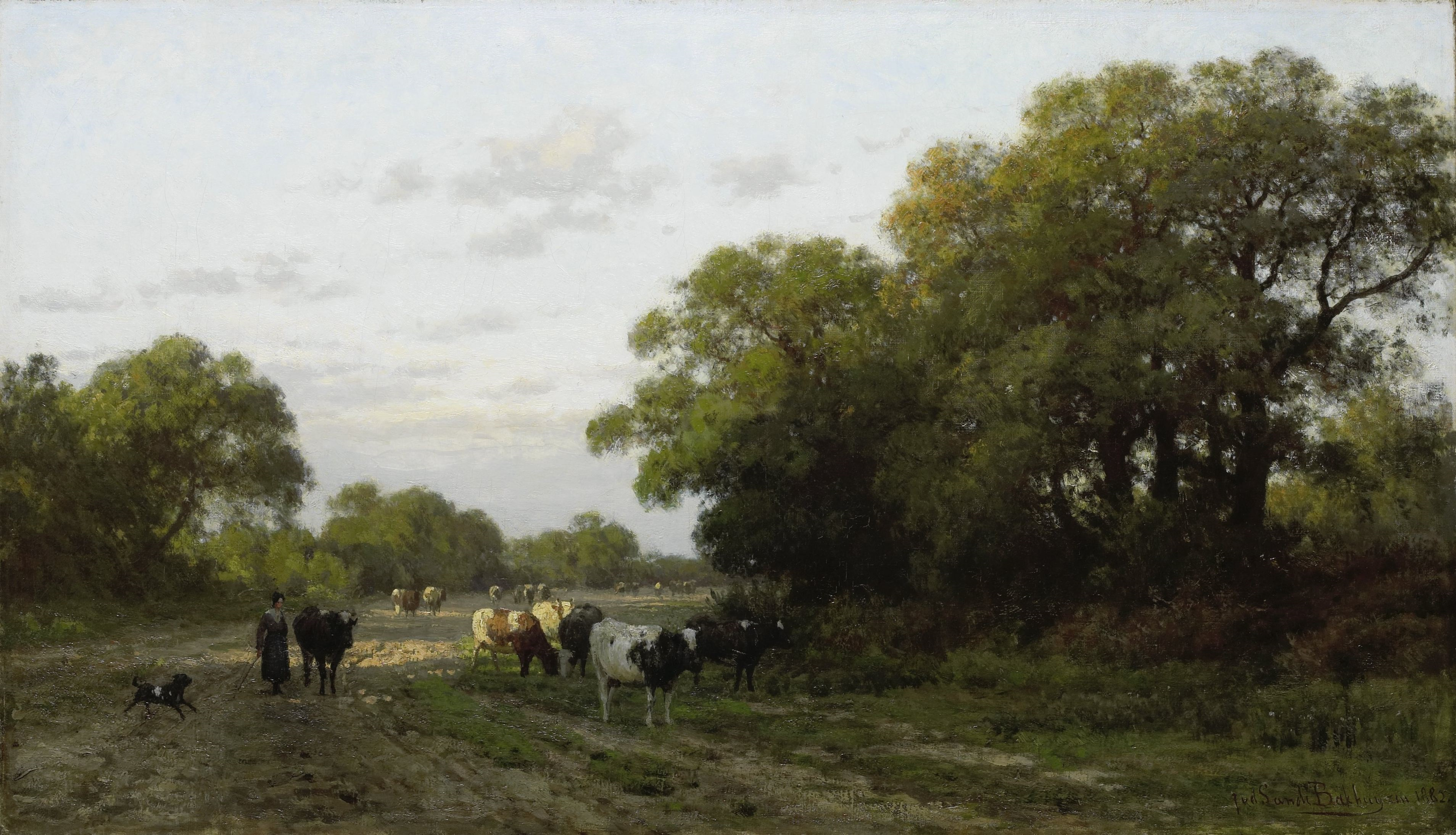 Landscap in Drenthe. oil on canvasmedium QS:P186,Q296955;P186,Q12321255,P518,Q861259. Height: 55 cm (21.6 ″); Width: 95.5 cm (37.5 ″) dimensions QS:P2048,55U174728;P2049,95.5U174728. Amsterdam, Rijksmuseum Amsterdam.